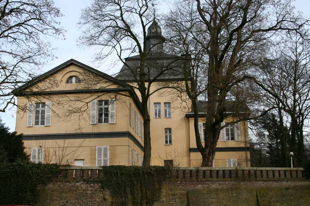 Beschreibung: Schloss Eller, Ansicht von Westen mit Turm der früheren Wasserburg Eller im Zentrum Quelle: erstellt am 19.02.2006 Fotograf oder Zeichner(in): Marie-Luise Carl andere Version: für GenWiki